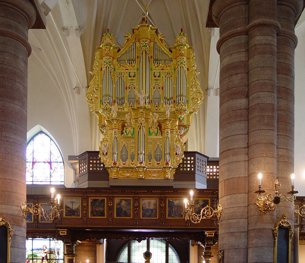 Tyska kyrkan (Deutsche Kirche) in Stockholm, Gamla stan. Orgel